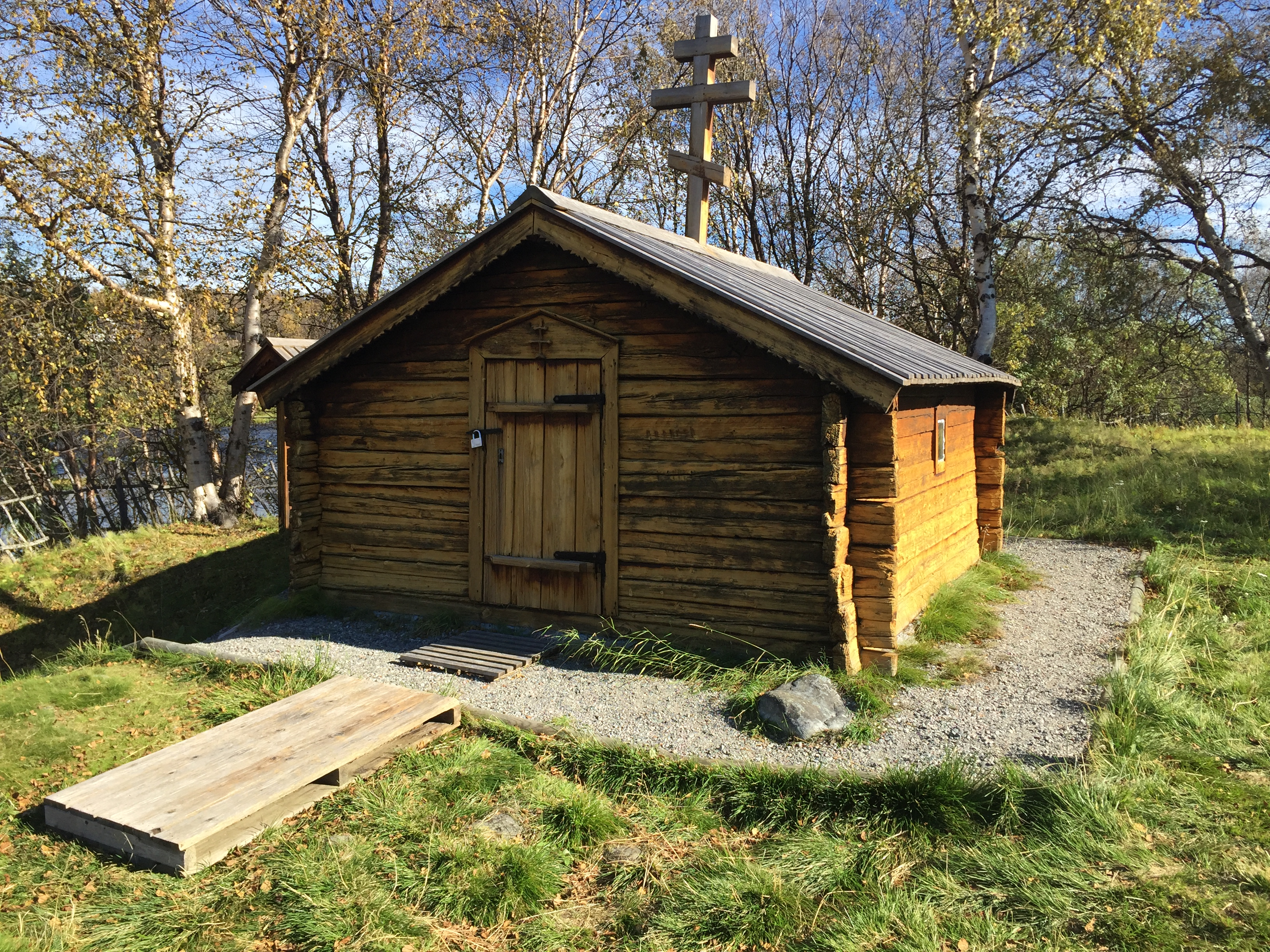 Sankt Georgs kapell - bilde av Christer Gundersen